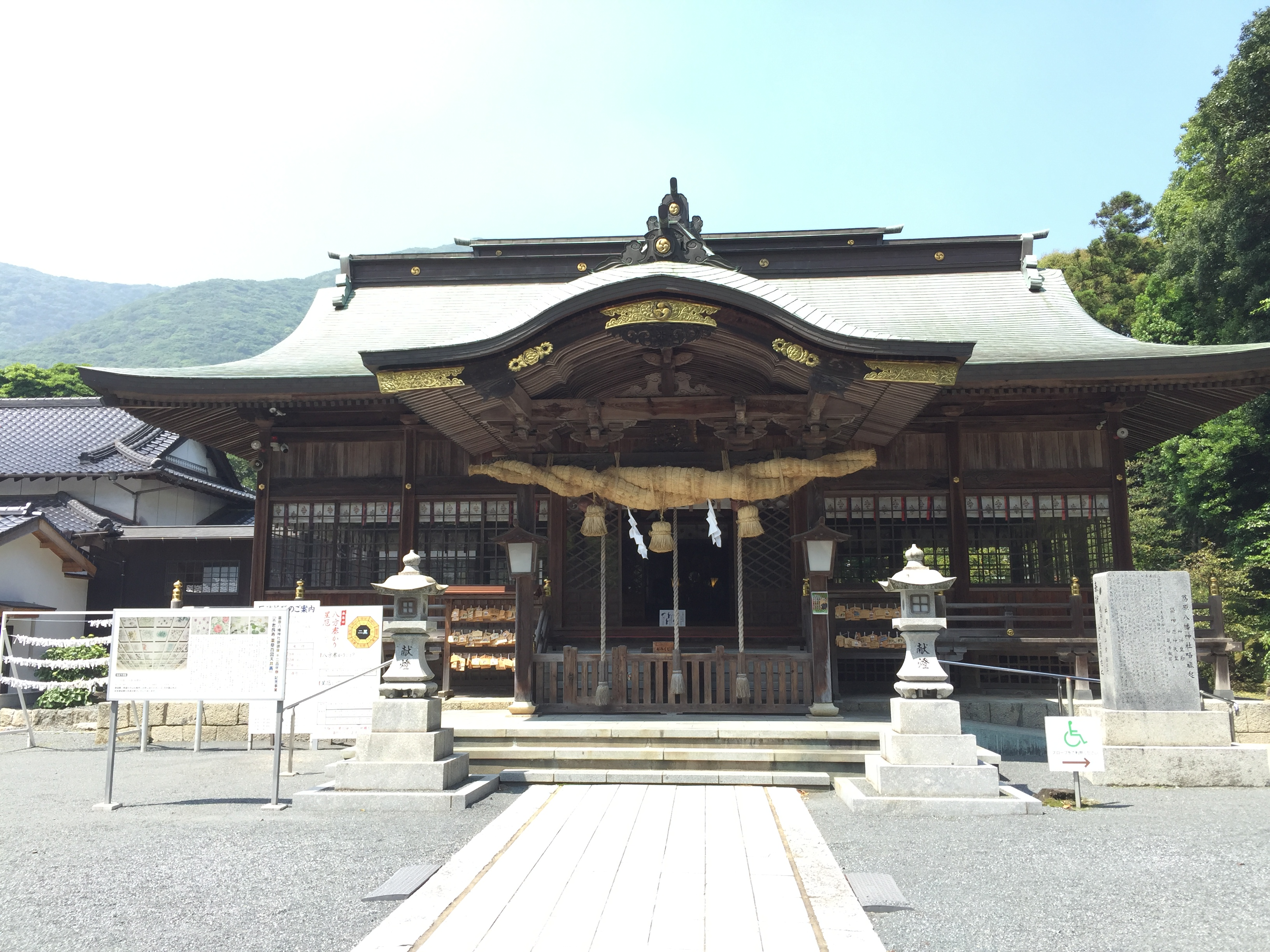 神社